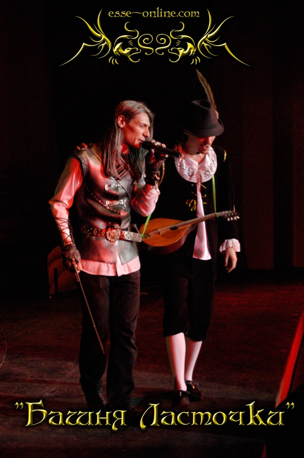 Рок-опера - "Дорога без возврата", по мотивам саги "Ведьмак" А. Сапковского. Сцена 12. "Башея Ласточки". Фото с концерта группы "ESSE" в Ростове-на-Дону 10.04.2010 г.